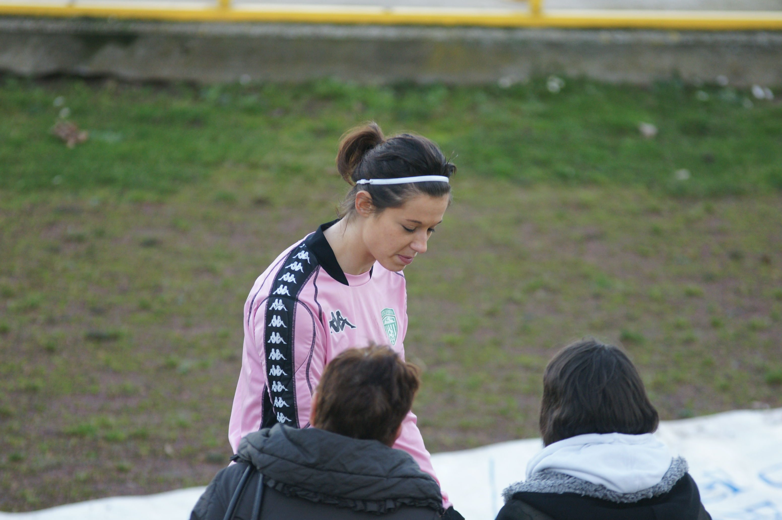 Photo de Céline Musin, gardienne du FCF Hénin-Beaumont